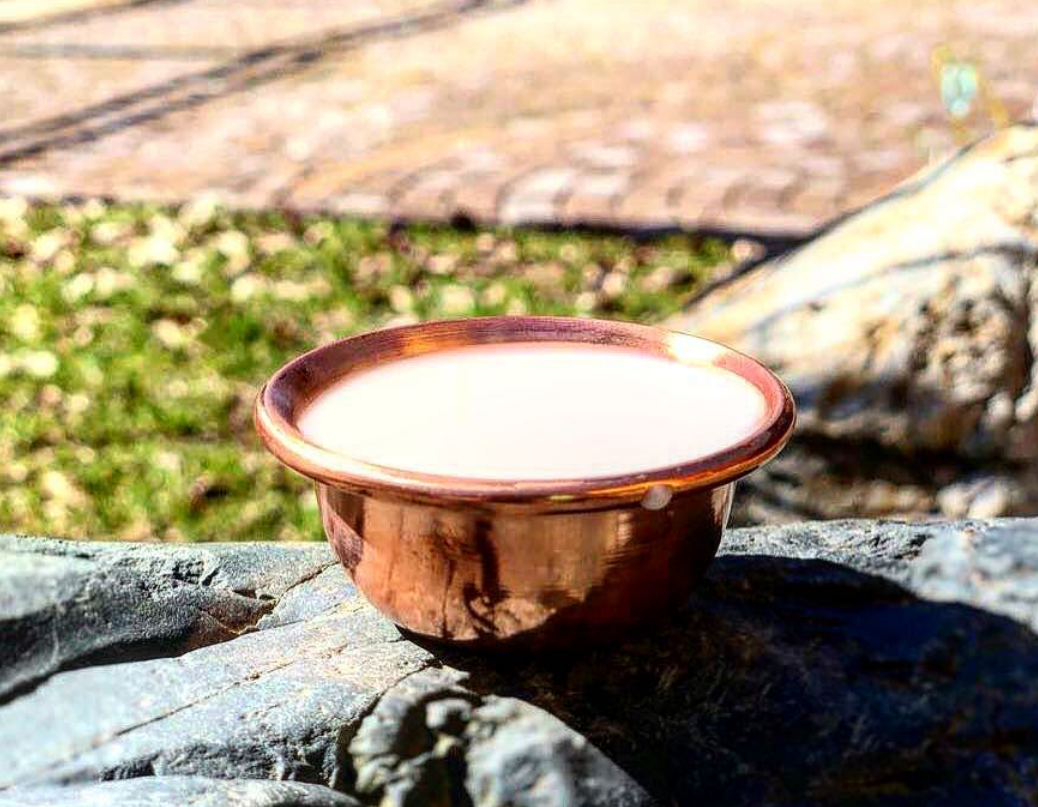 A bowl of milk for the shaman rite. Buryatia. Russia